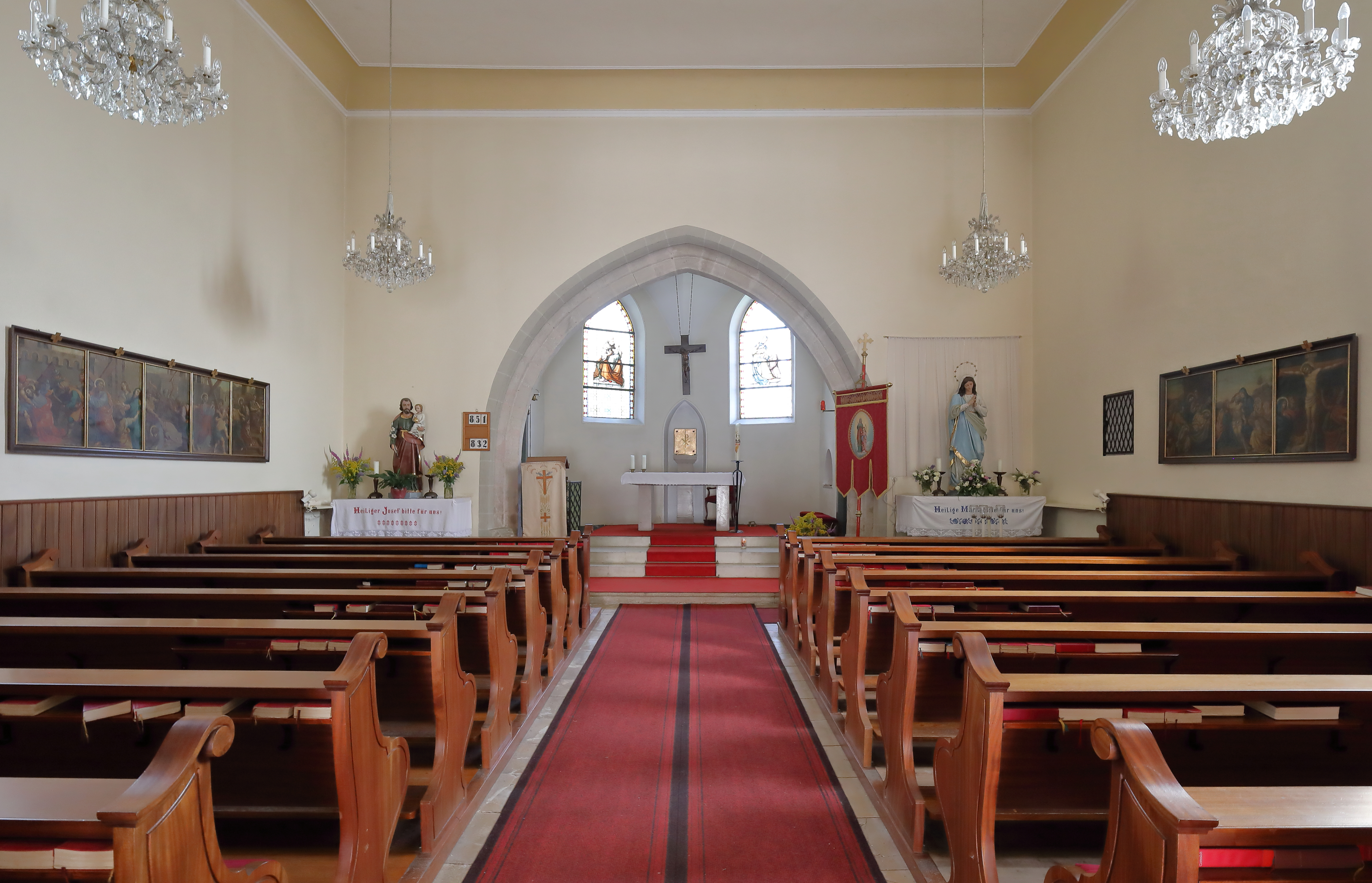 Innenansicht der röm.-kath. Pfarrkirche hl. Johannes der Täufer in Mittergrabern, ein Ortsteil der niederösterreichischen Marktgemeinde Grabern.